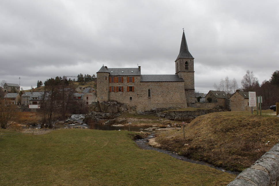 Taken in Lozere, Languedoc-Roussillon